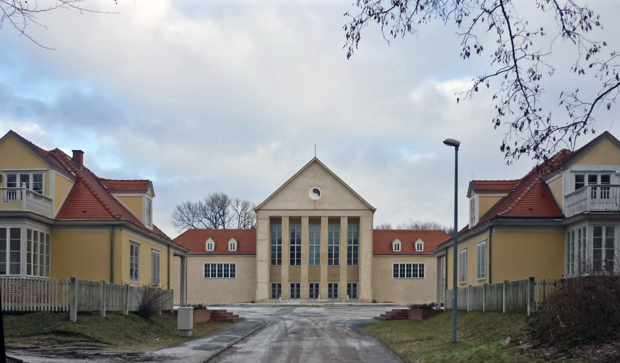 Festspielhaus Hellerau und 2 Pensionshäuser